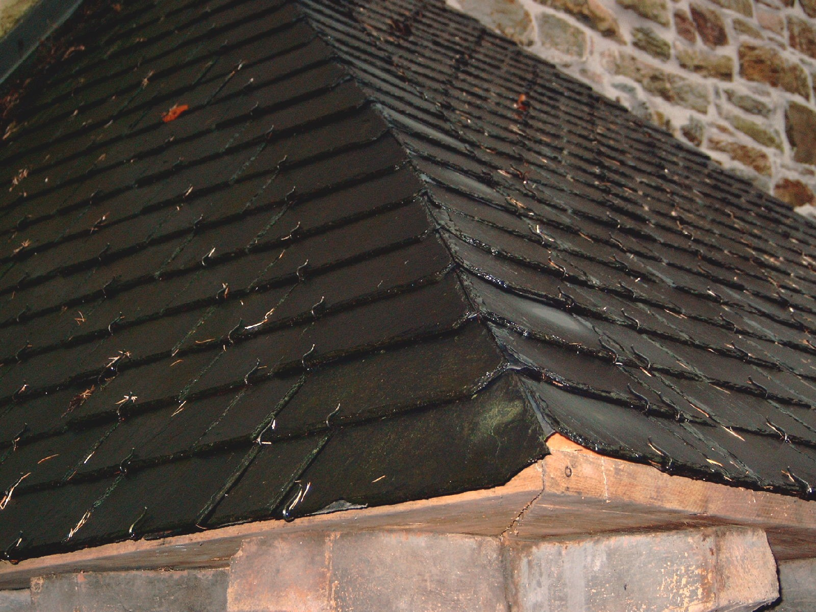 Dak van leisteen. 11 november 2005